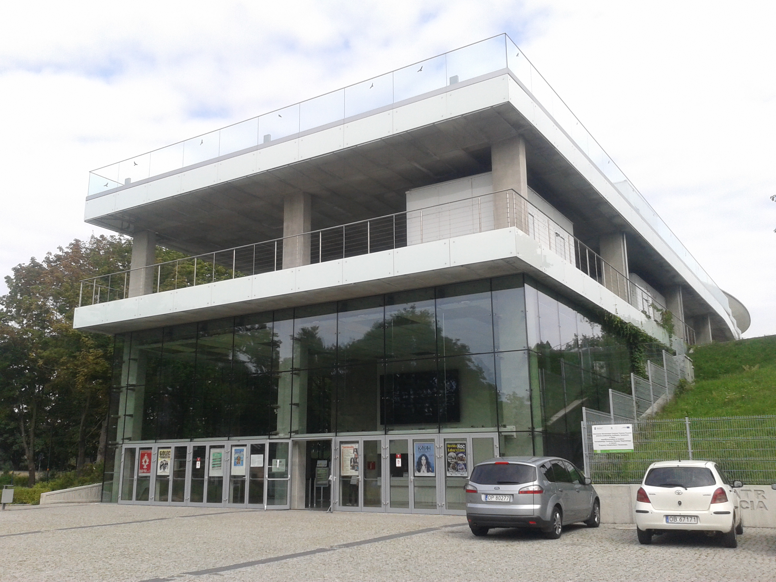 Muzeum Polskiej Piosenki w Opolu w 2014 roku.